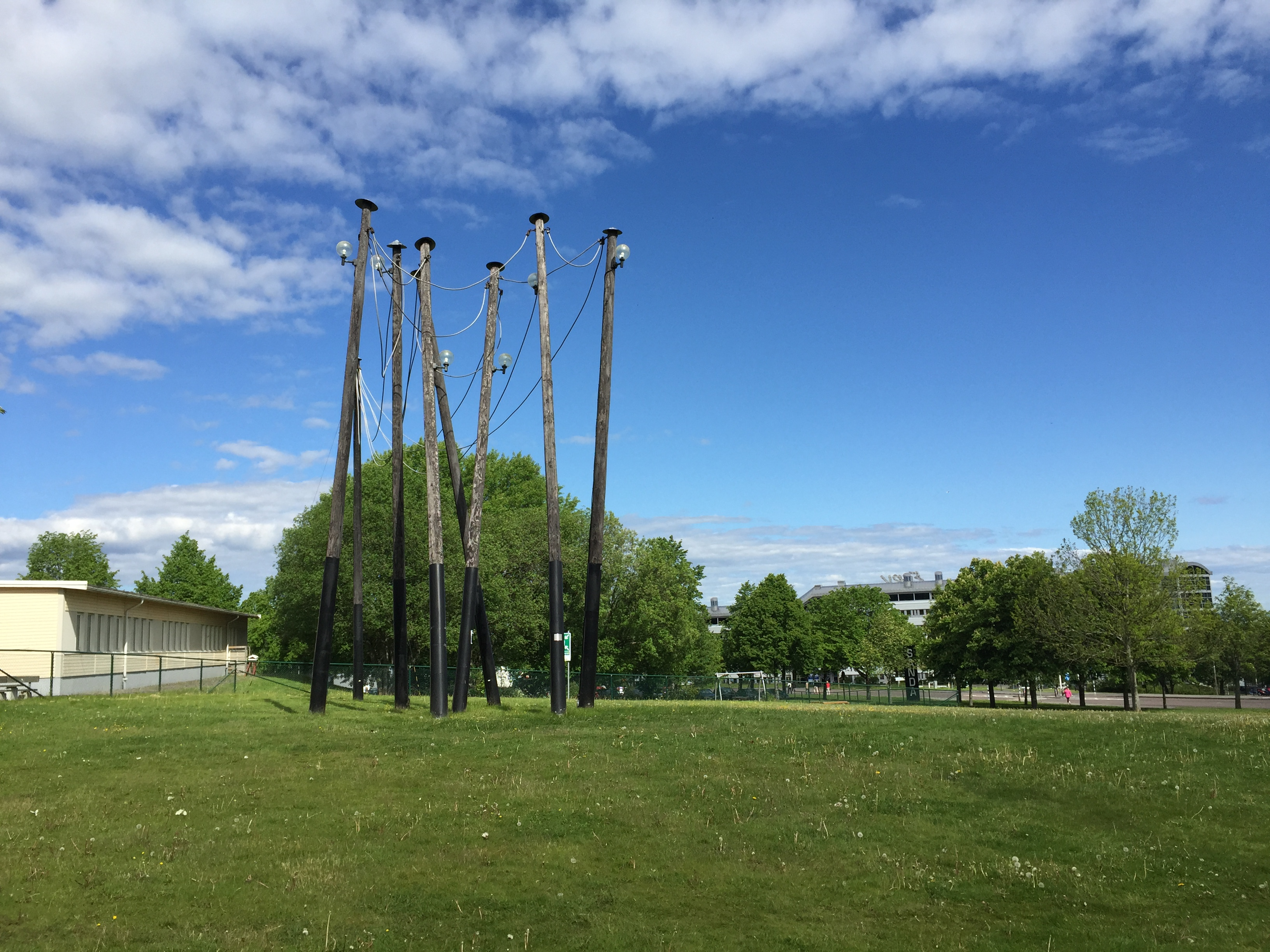 Kommunikation, installation av Sven Hagmarker 1981 utanför Sandagymnasiet i Huskvarna